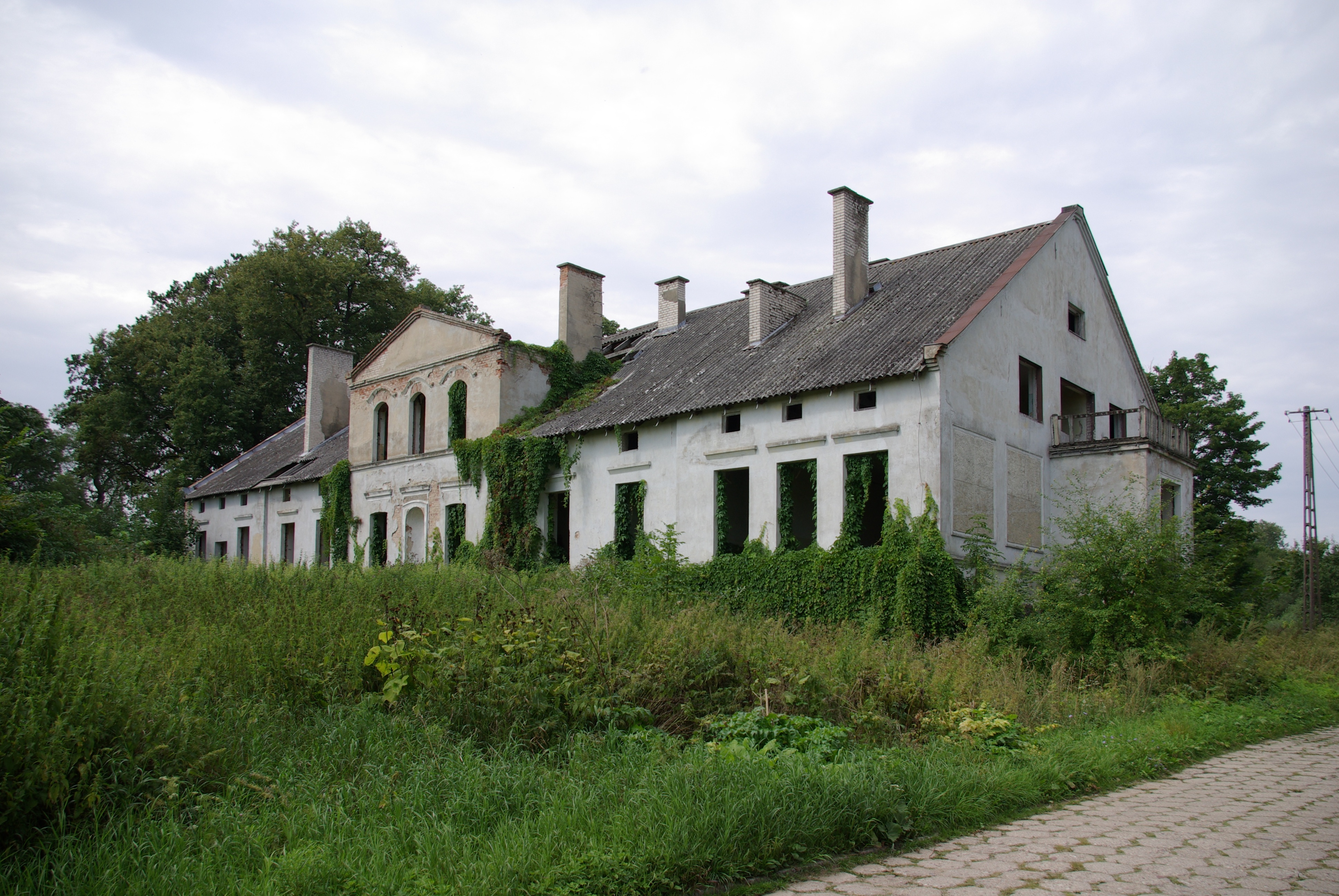 Dwór w Dąbrówce